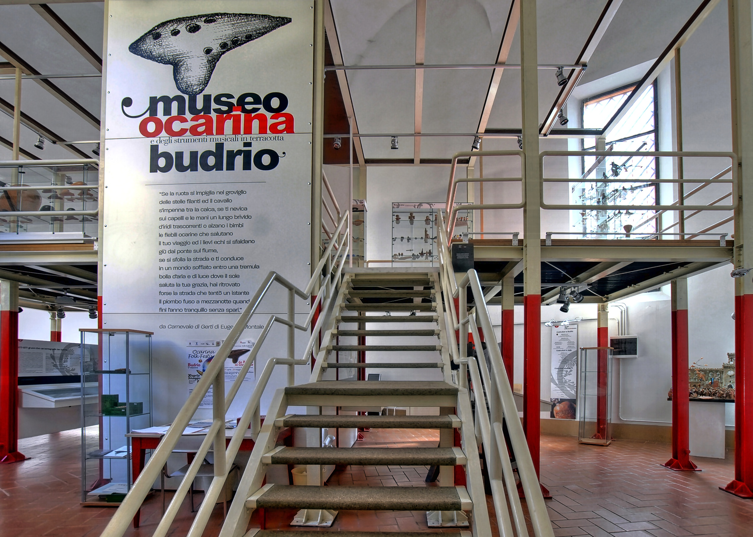 Museo dell'ocarina di Budrio This is a photo of a monument which is part of cultural heritage of Italy.